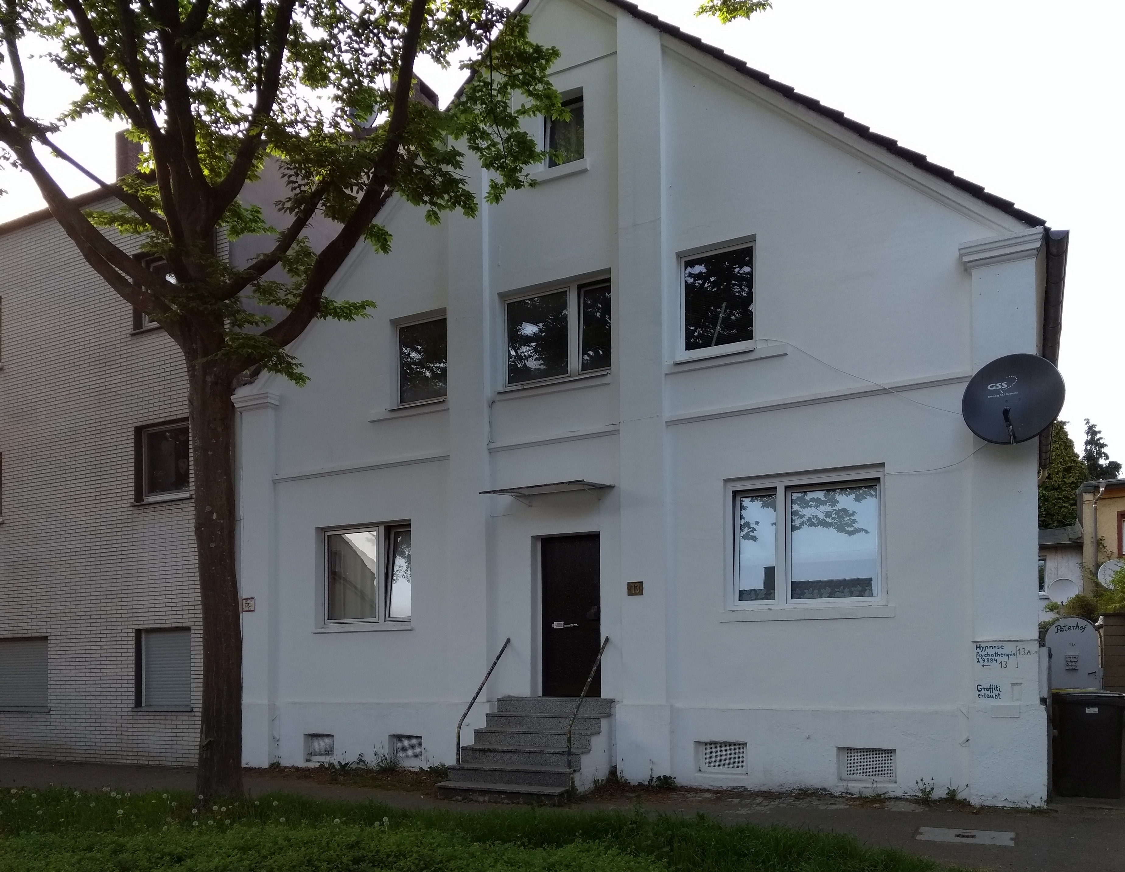 Private Graffitiwand in Gelsenkirchen-Ückendorf